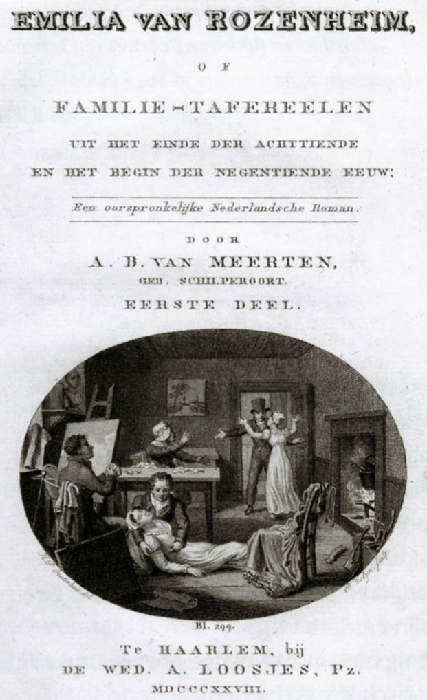 Titelpagina van Emilia van Rozenheim geschreven door Barbara van Meerten-Schilperoort